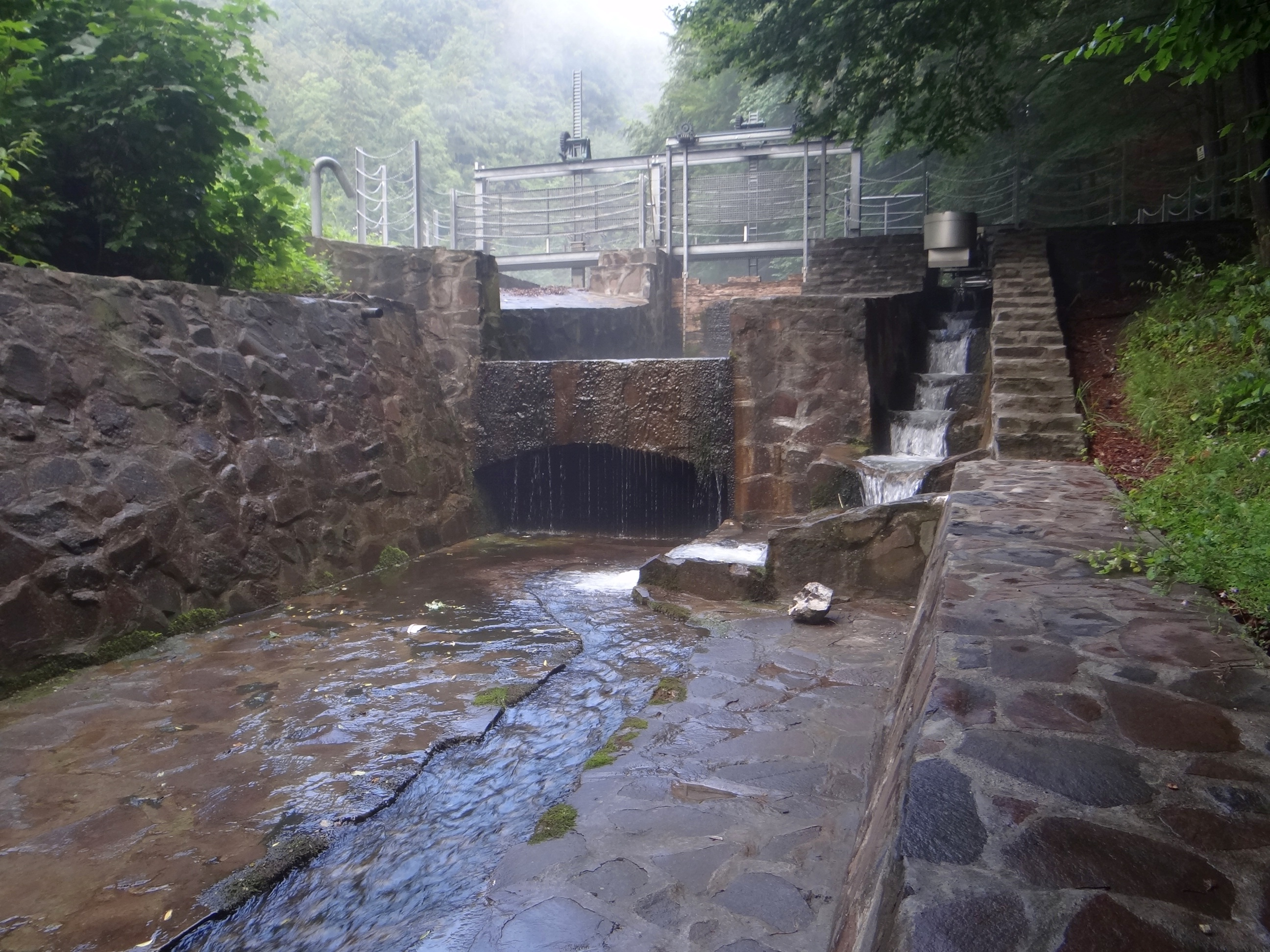 Potok Harmanec. Śluza